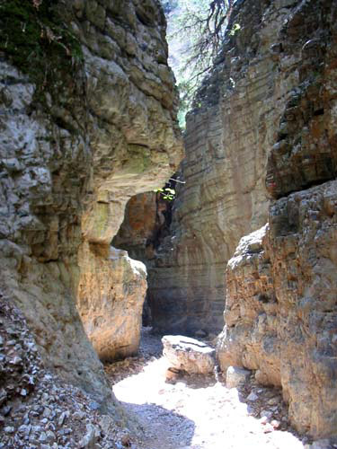 Imbros Gorge Crete